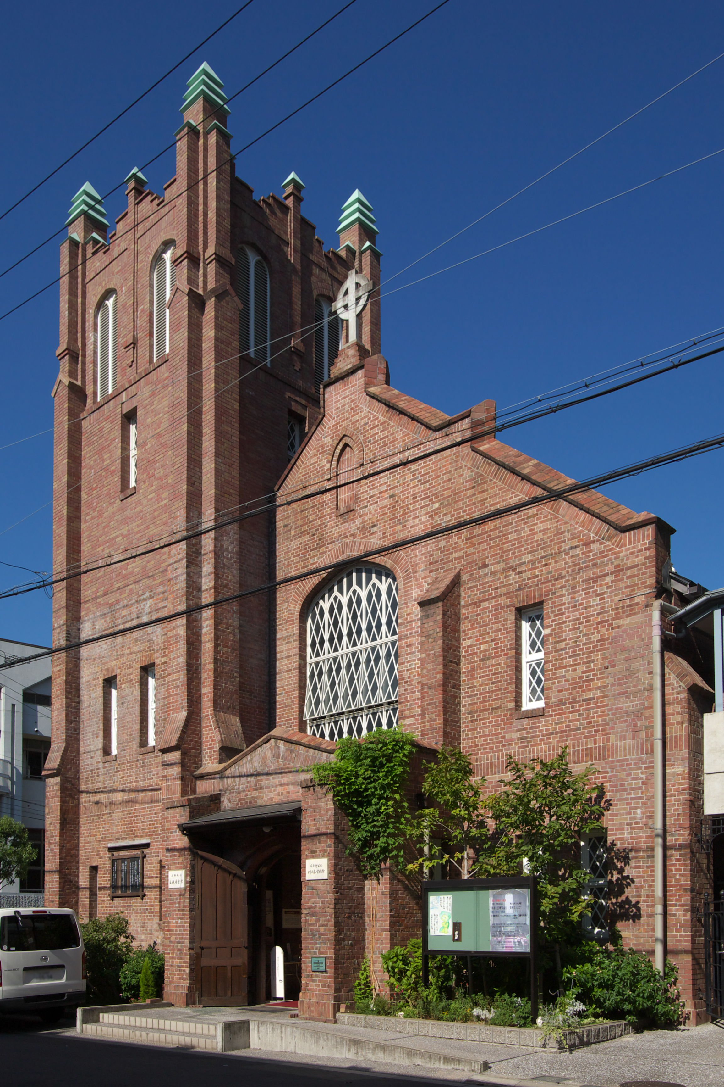 Kawaguchi Church (Osaka City) / 川口基督教会（大阪市）